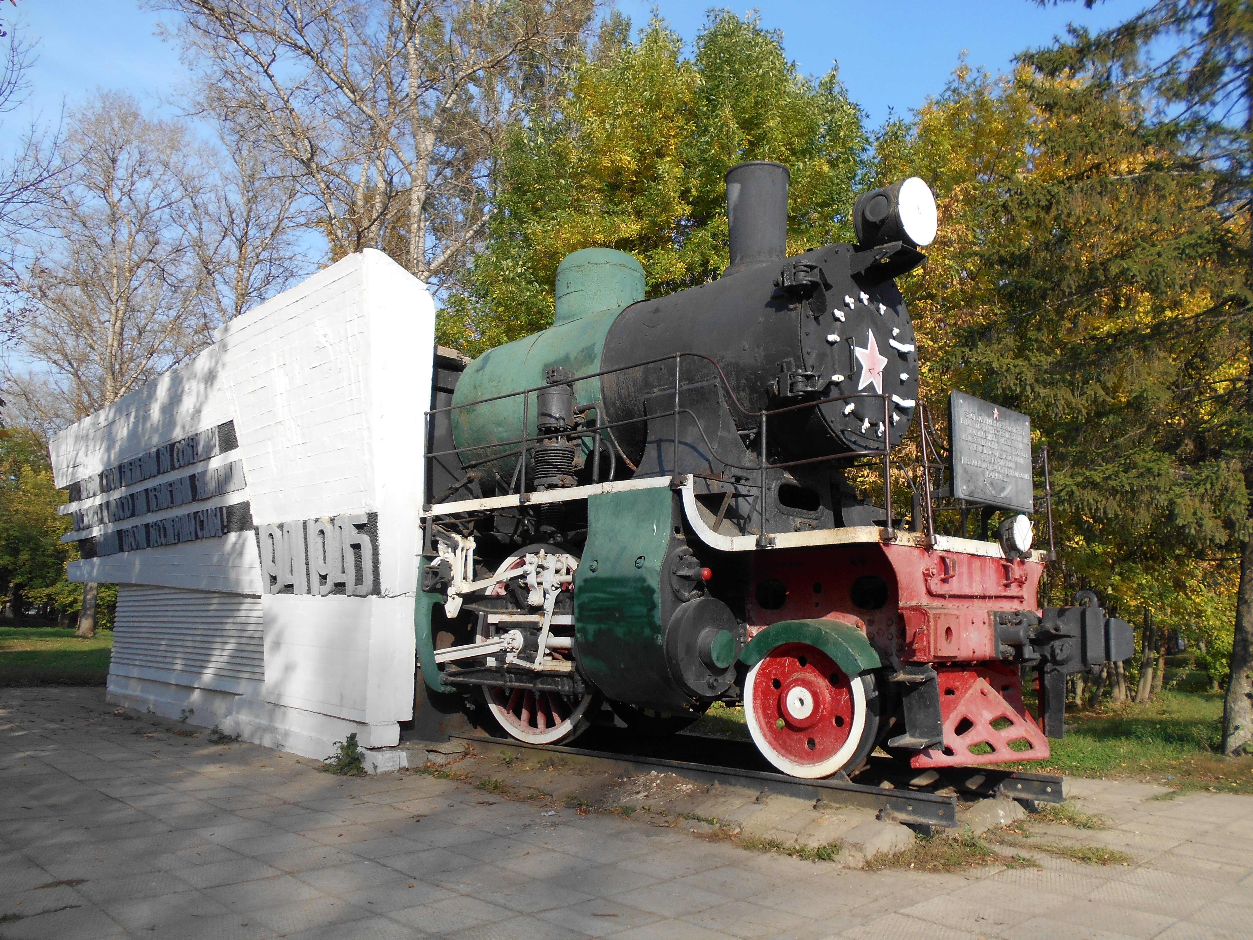 Памятник Паровоз, установленный в честь мужества и героизма железнодорожников в годы Великой Отечественной войны: улица Мира, Ржев, Ржевский район, Тверская область